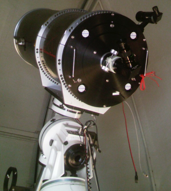 Az ELTE Ritchey-Chrétien távcsöve (Budapest, ELTE lágymányosi épülete)